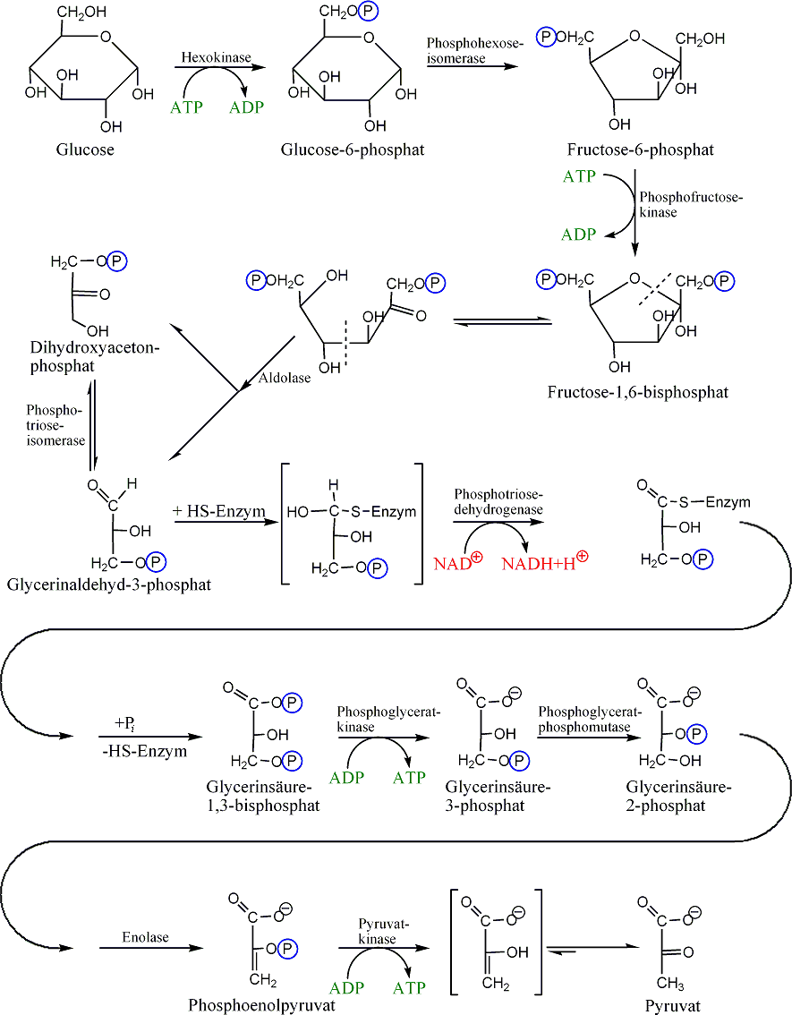 Darstellung der Glykolyse